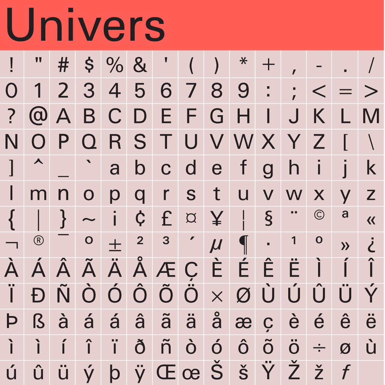 Lletra tipogràfica Univers (exemple complet)